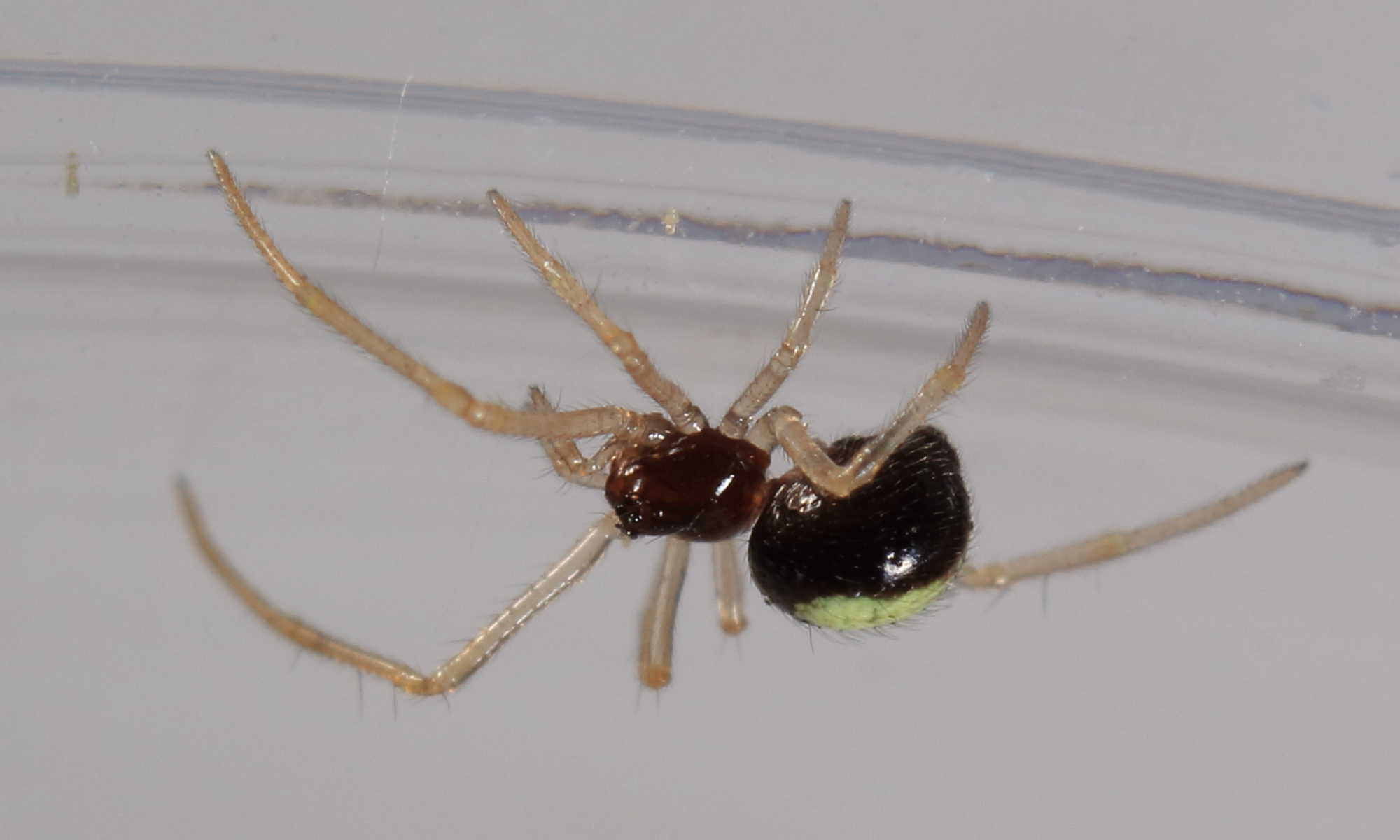 Haubennetz- oder auch Kugelspinne Neottiura bimaculata, Körperlänge max 2mm, gefunden draußen im Garten Die abgebildete Spinne wurde am 27. Mai 2015 von Mhohner auf WP:RBIO/B bestimmt The spider shown here has been identified by Mhohner 2015, May 27th on WP:RBIO/B